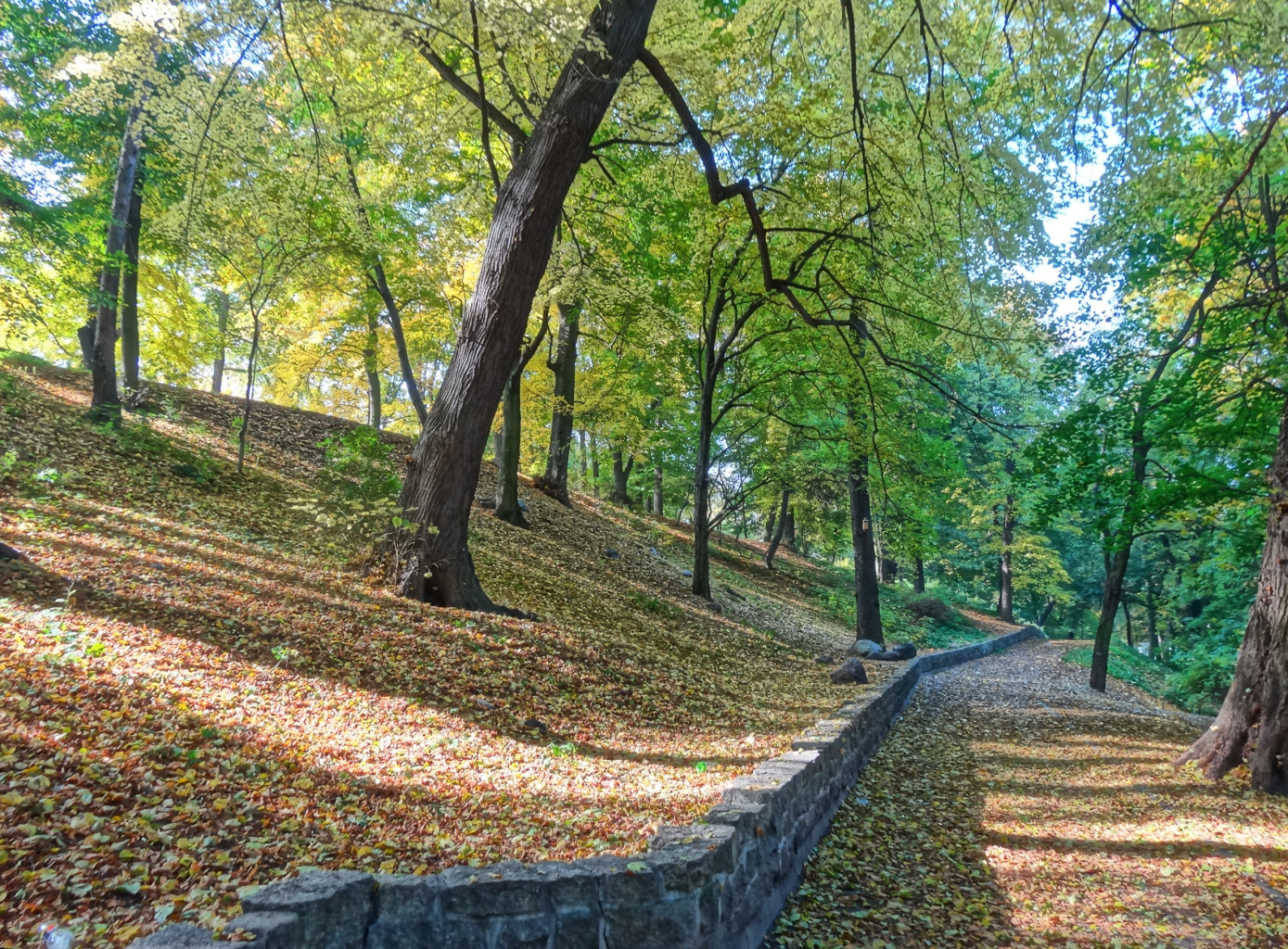 Park im. gen. Henryka Dąbrowskiego w Bydgoszczy przy ul. Filareckiej